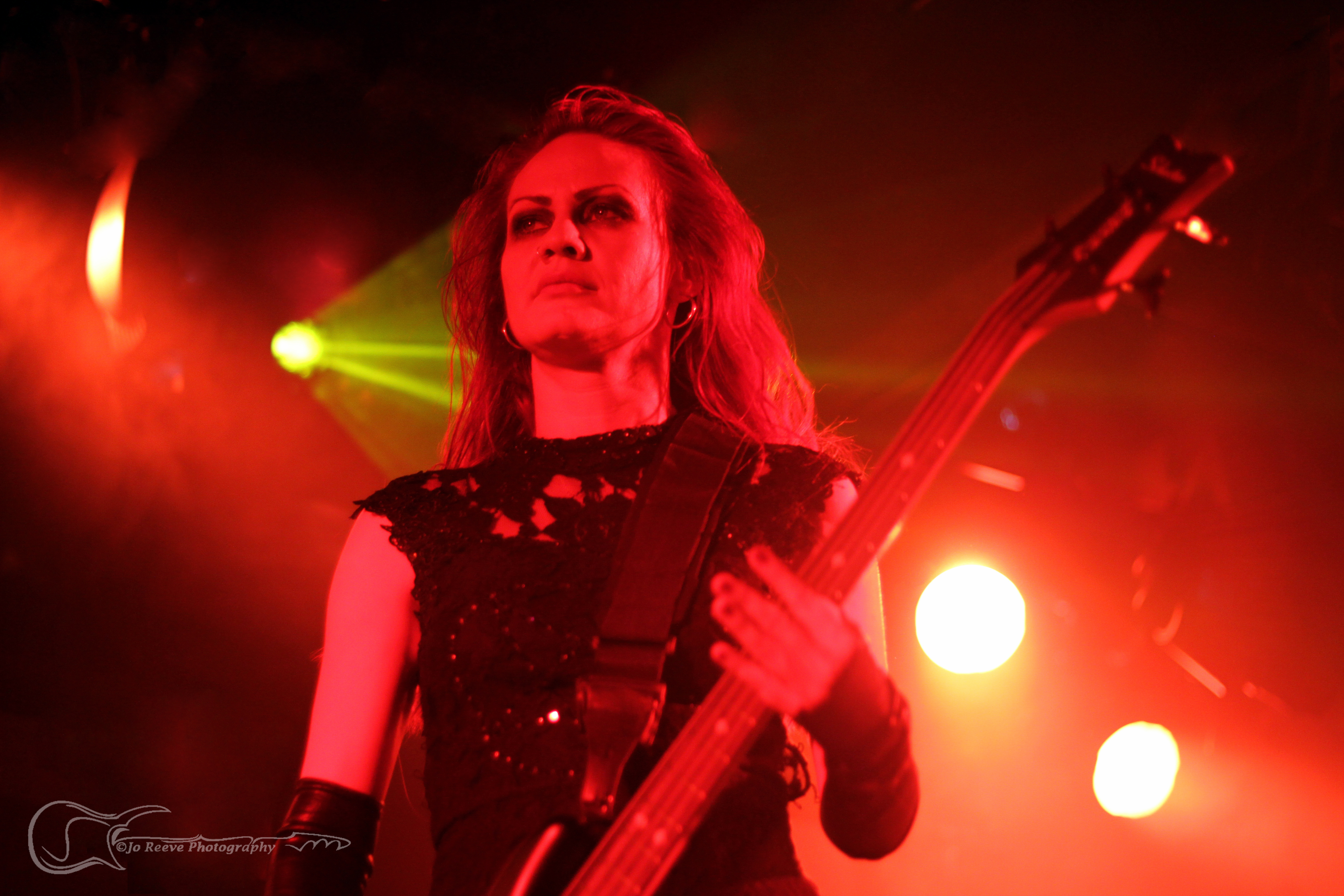 Nadja Peulen de Coal Chamber, Norwich Waterfront, 21/05/15